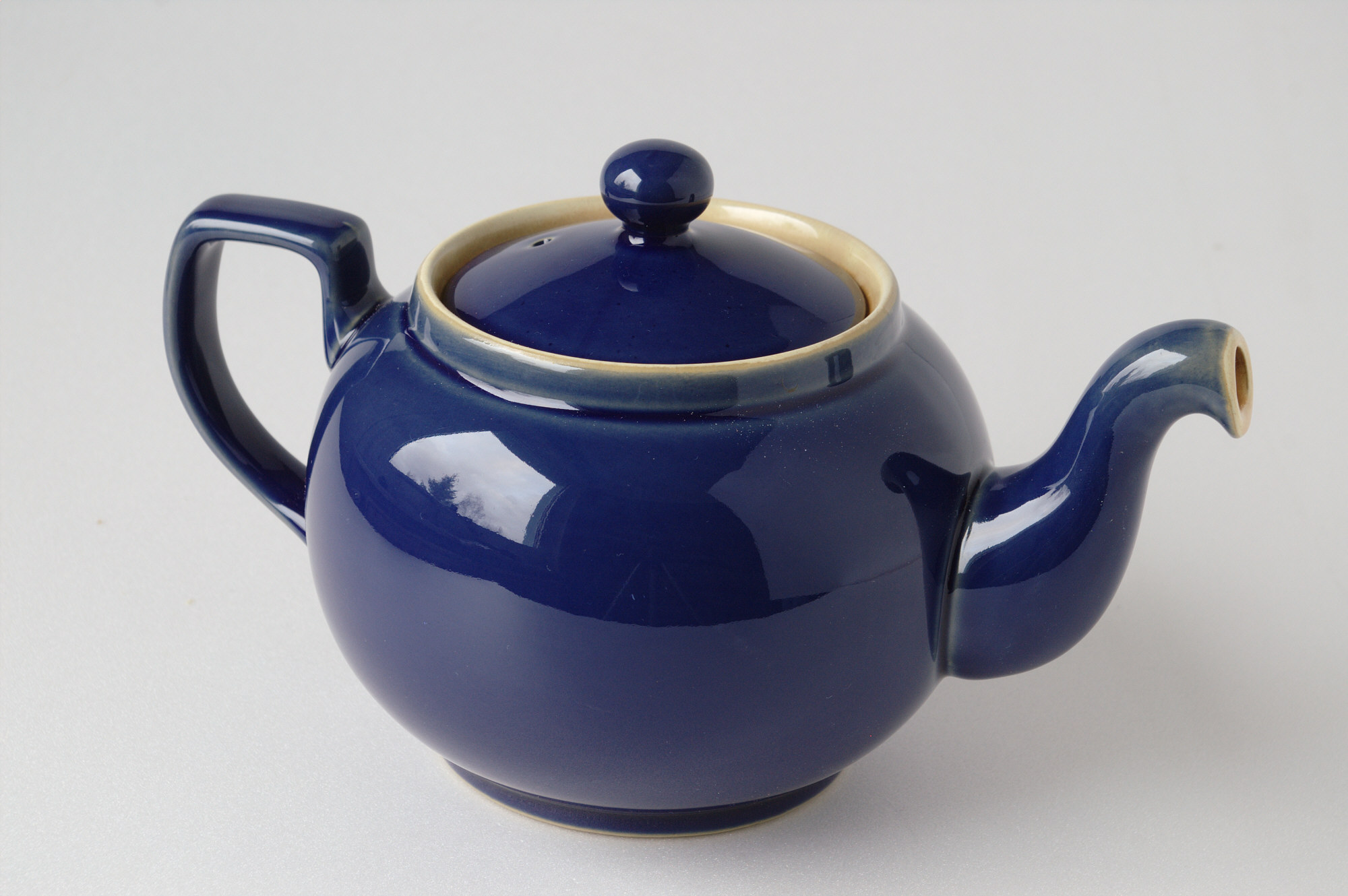 Beleuchtungstechniken bei Sachaufnahmen. Beleuchtung per Nordfenster und Aufhellpappe. Teekanne Denby "neverdrip" in blau, ein Design aus den 1920er oder 1930er Jahren